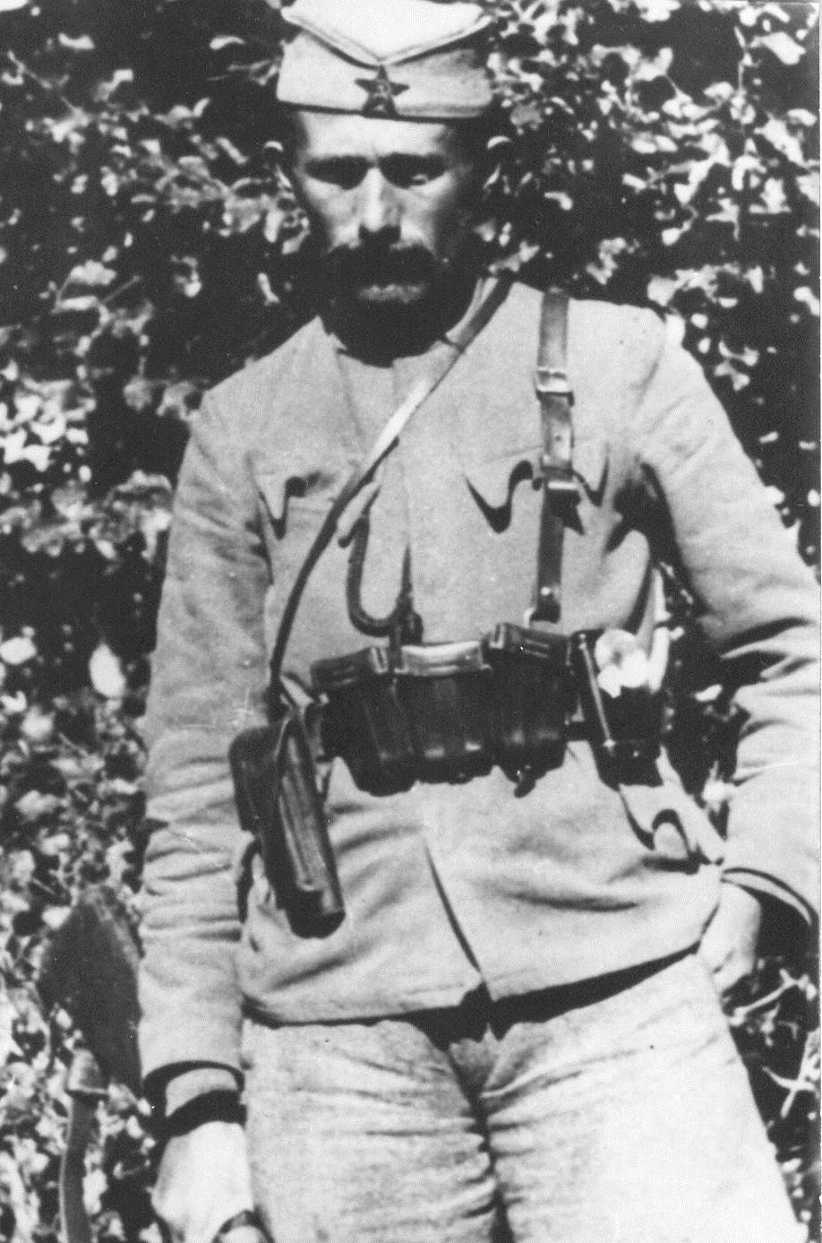 Vladimir Vlado Tomanović (Velimlje, kod Nikšića, 15. januar 1907 — 1943), učesnik Narodnooslobodilačke borbe i narodni heroj Jugoslavije.